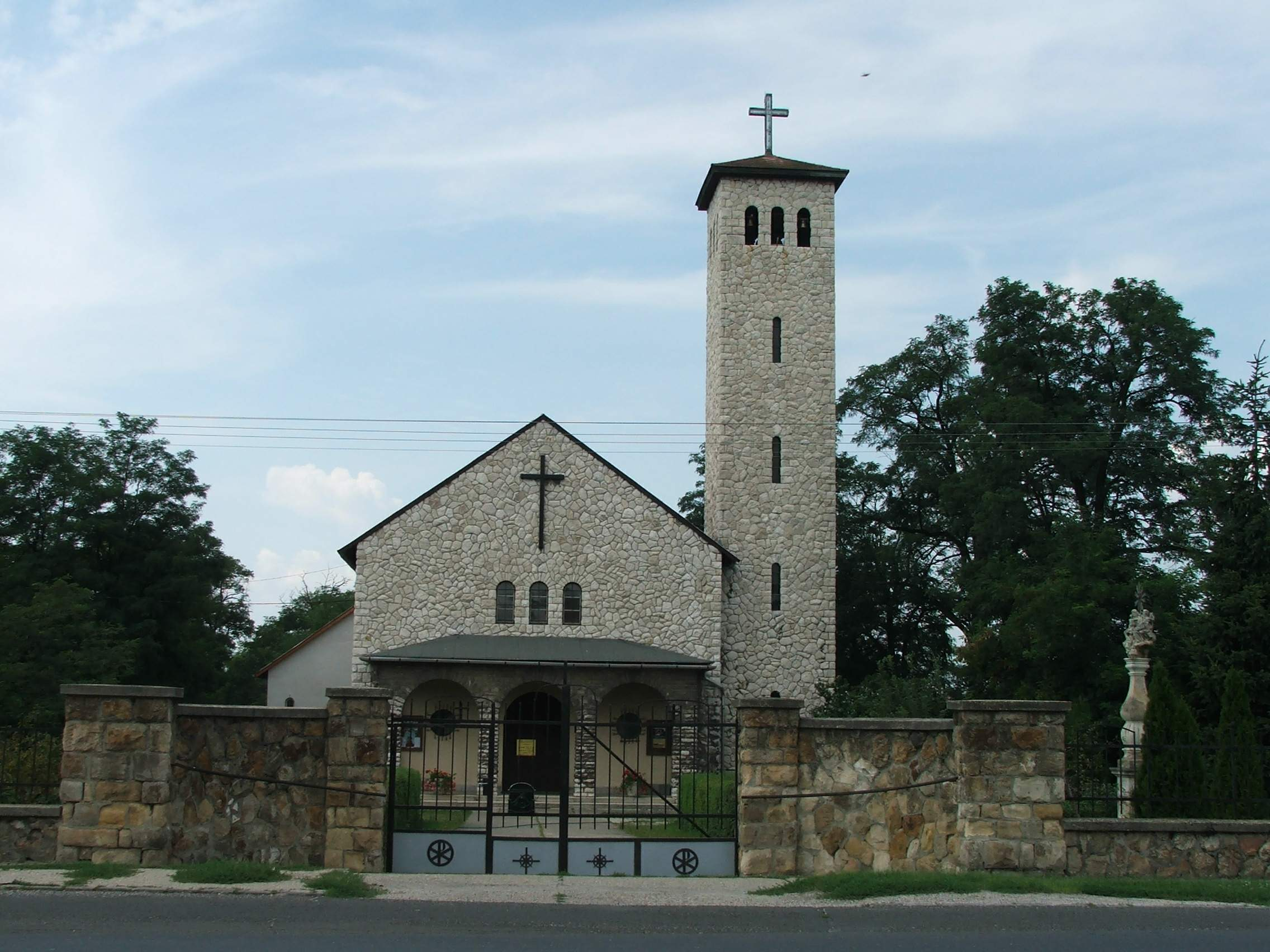 Szent István király-plébániatemplom